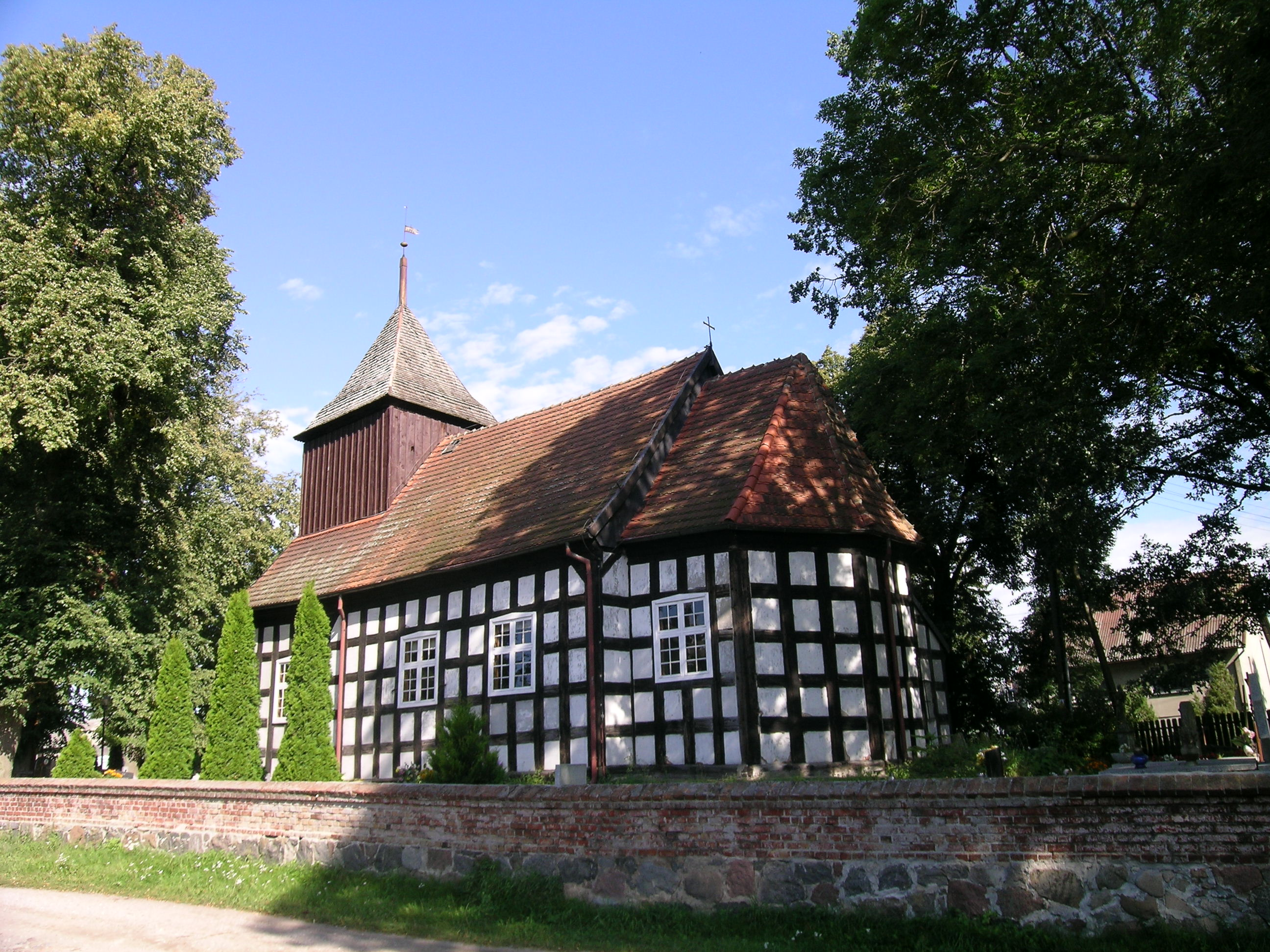 Ciechocin - kościół p.w. św. Marcina